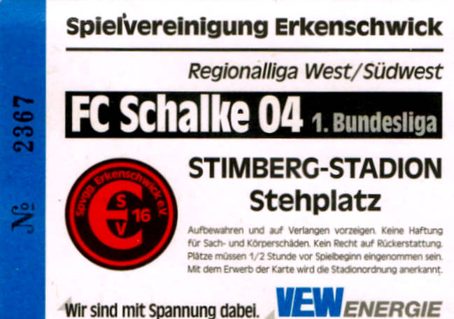 Eintrittskarte Reundschaftsspiel ESV-S04